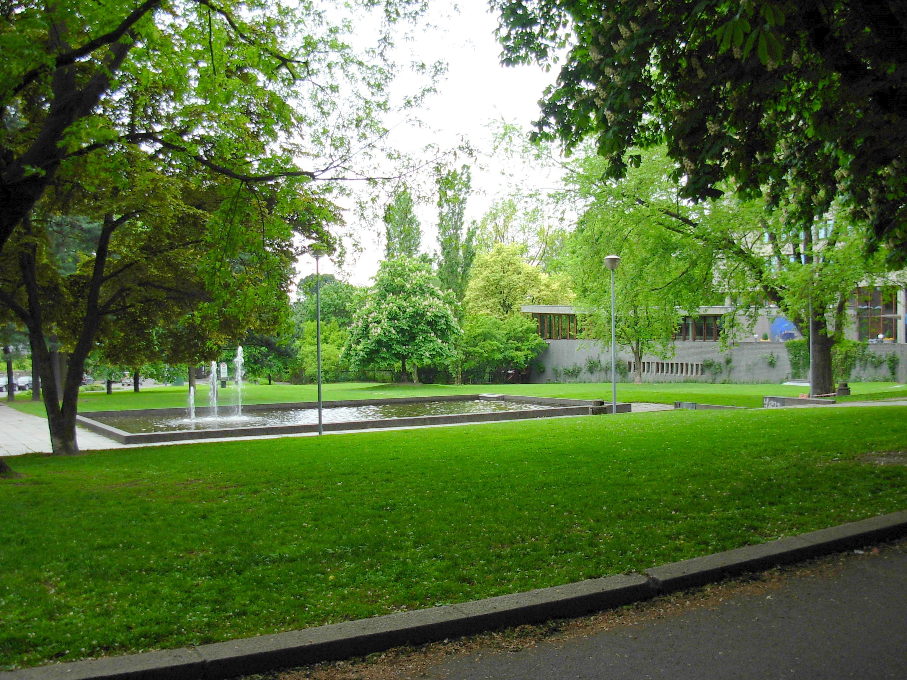 Hydroparken, Bygdøy allé, Oslo